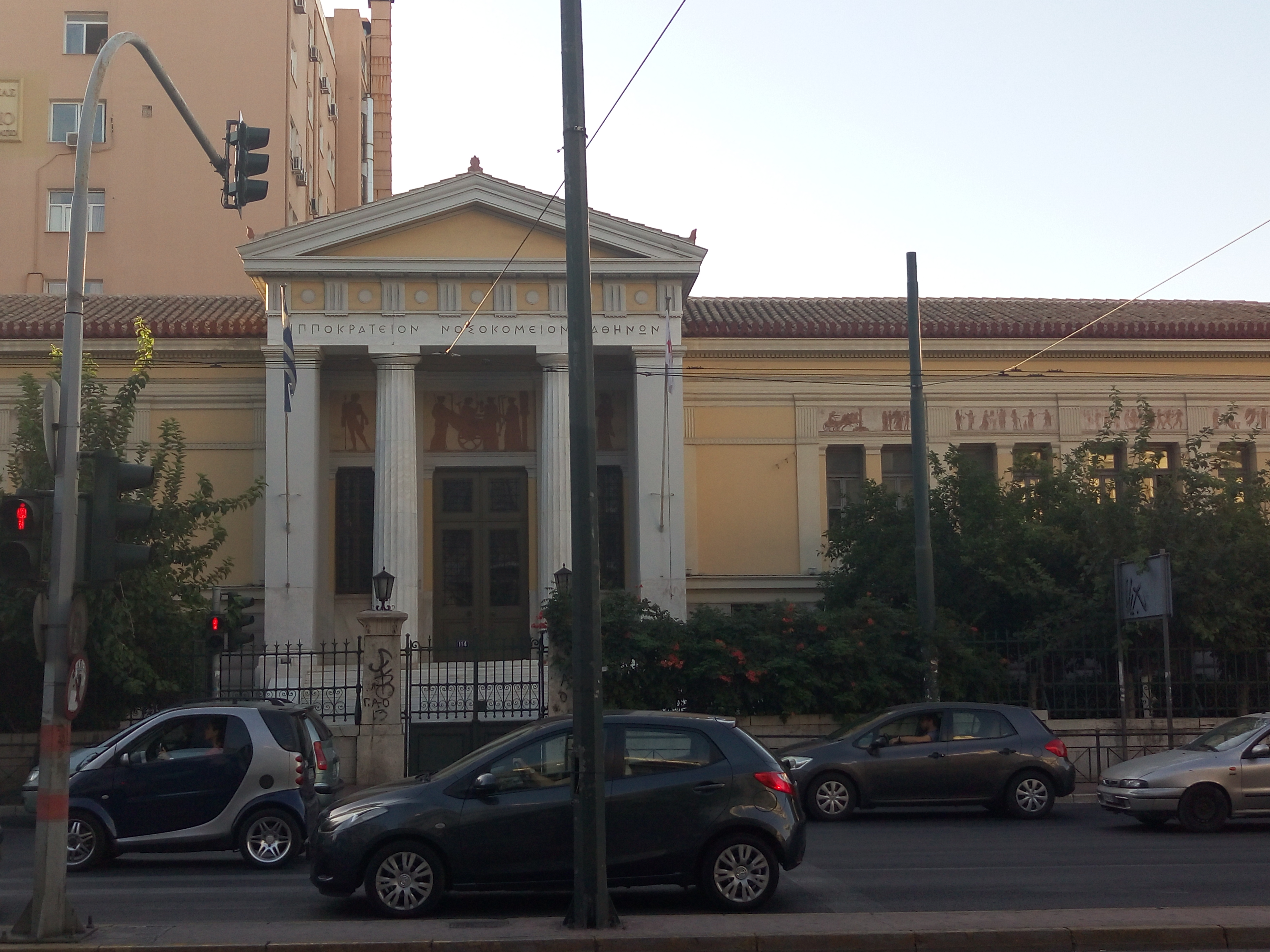 Ιπποκράτειο Νοσοκομείο«Ιπποκράτειο Νοσοκομείο»